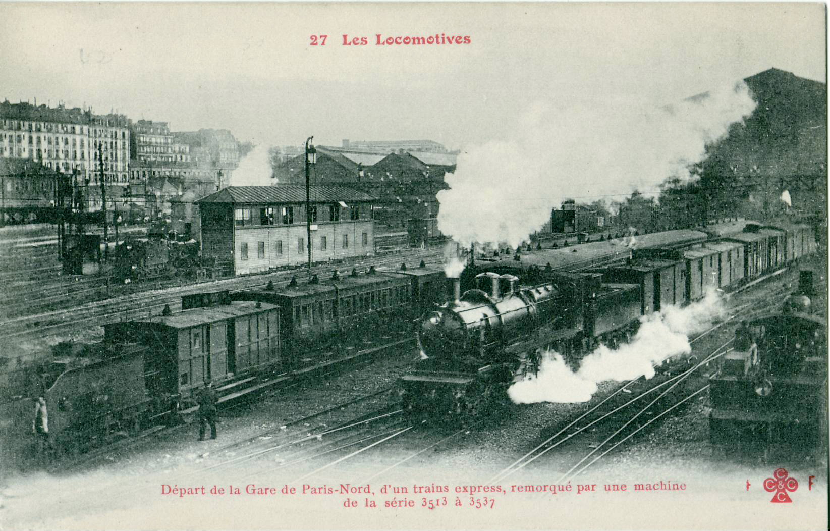 Carte postale ancienne éditée par FF - CCCC, n°27 LES LOCOMOTIVES - Départ de la Gare du Nord, d'un train express, remorqué par une machine de la série 3513 à 3537